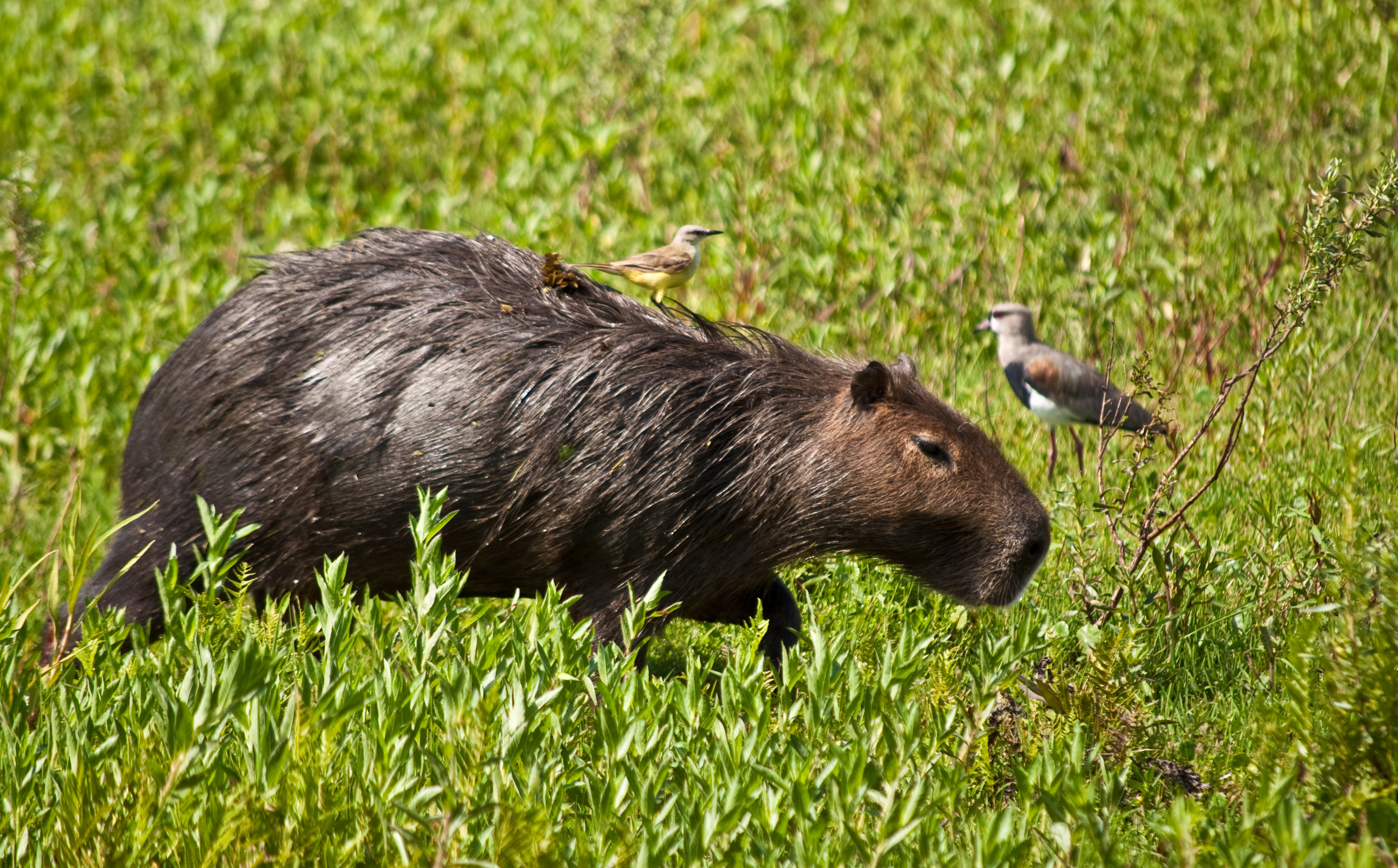 Esteros Del Ibera, Corrientes, Argentina, 3rd. Jan. 2011